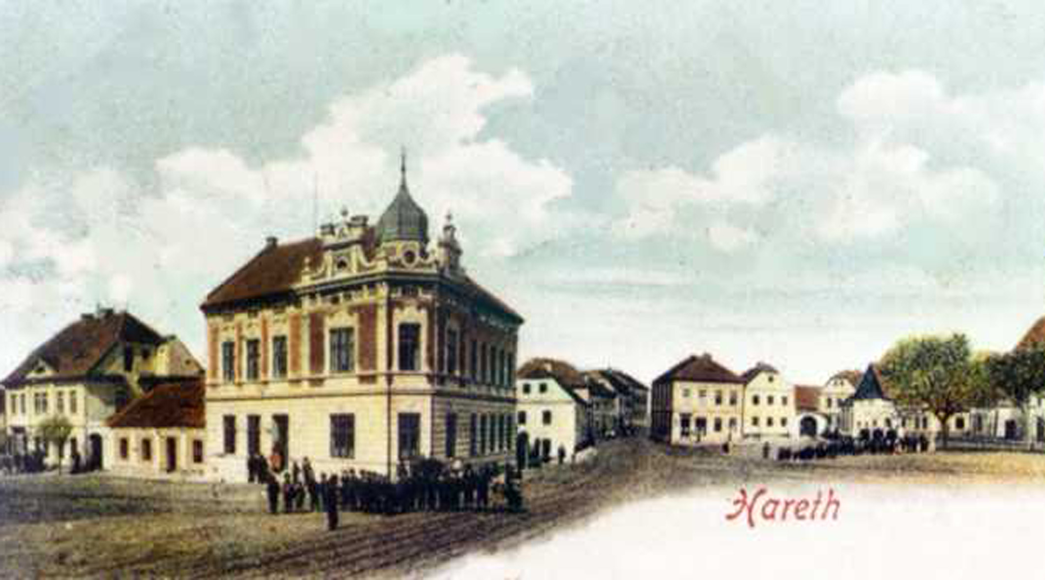 Ehemaliges Dorf Hořany (Hareth) bei Most (Brüx) in Tschechien.